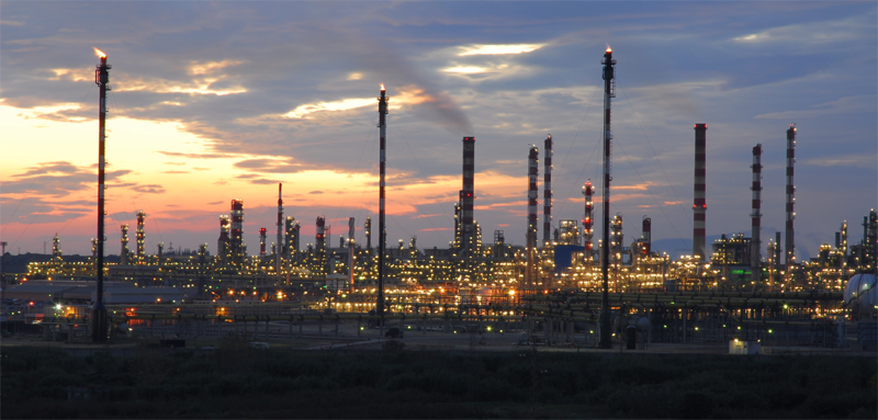 ca: Polígon Nord, La Pobla de Mafumet (Tarragona, Catalunya, Espanya) en: Factories, La Pobla de Mafumet (Tarragona, Catalonia, Spain) es: Polígono Norte, La Pobla de Mafumet (Tarragona, Cataluña, España) fi: Tehtaita, La Pobla de Mafumet (Tarragona, Katalonia, Espanja)